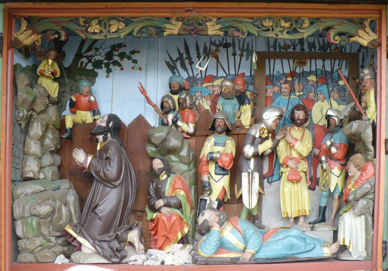 Geschnitzter Ölberg von 1512 in der Außenwand der Walterichskirche in Murrhardt